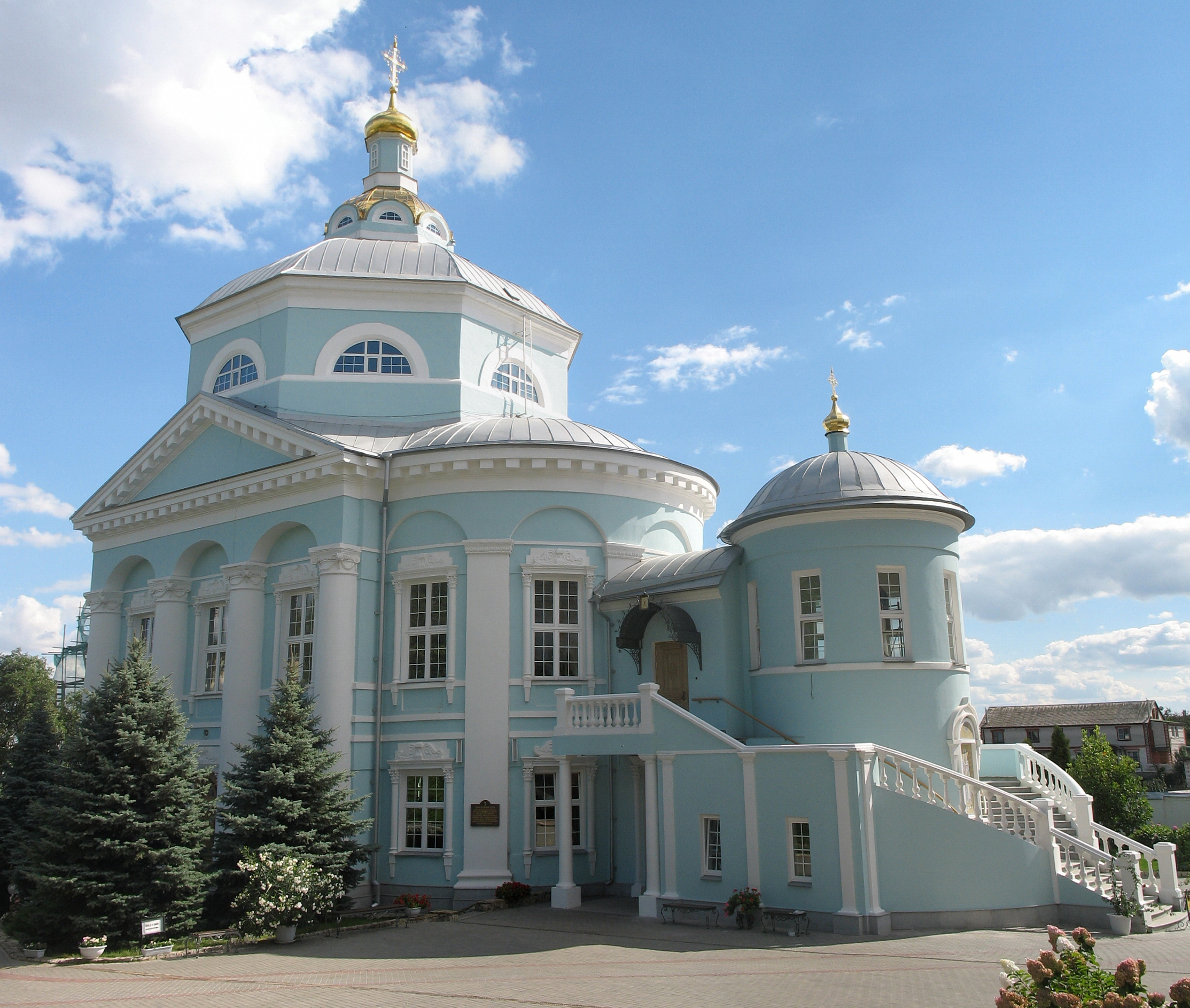 Церковь Алексия, митрополита Московского: улица Освобождения Труда, 1, Воронеж, Воронежская область